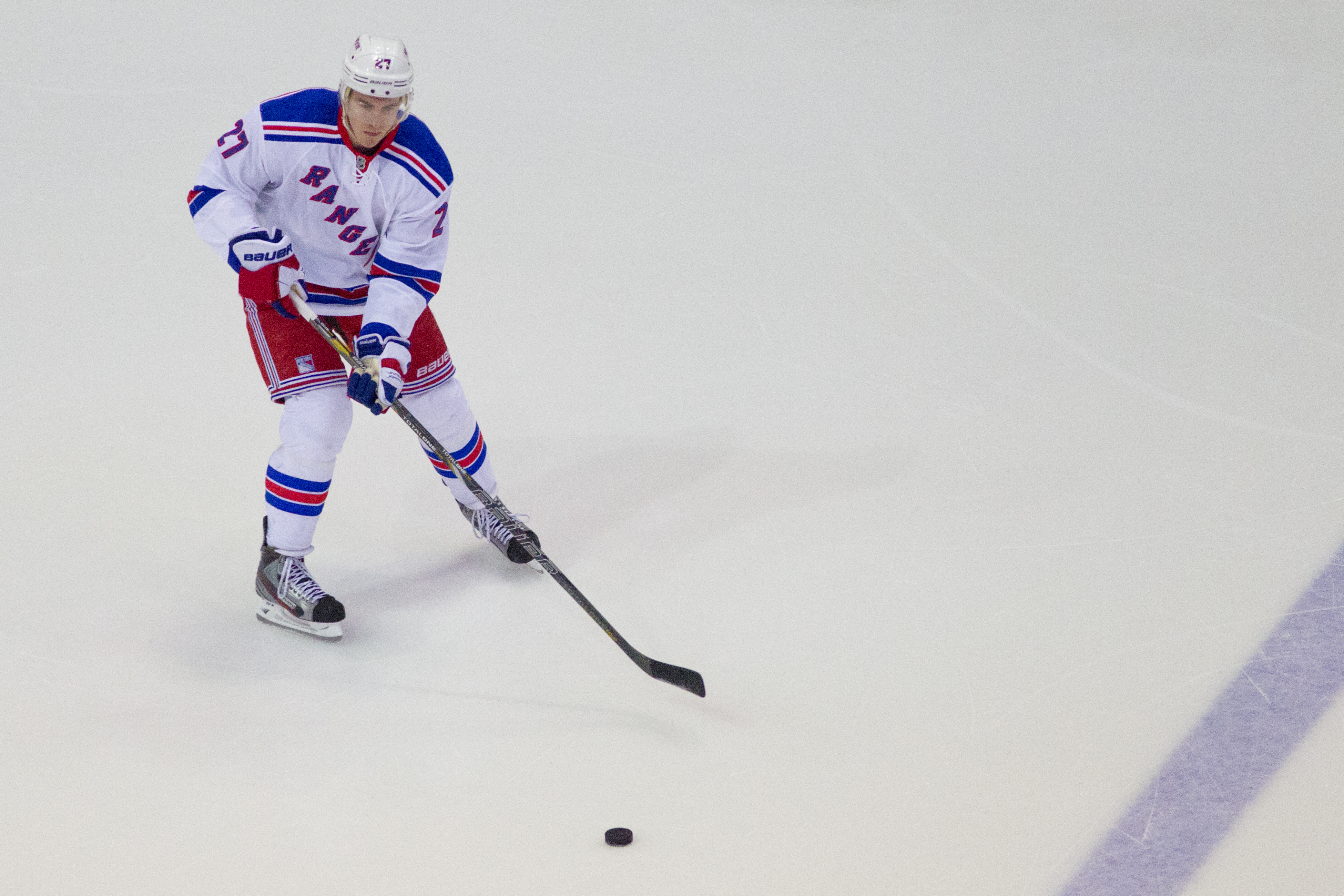 Ryan McDonagh, 03/07/2013 - Islanders vs Rangers